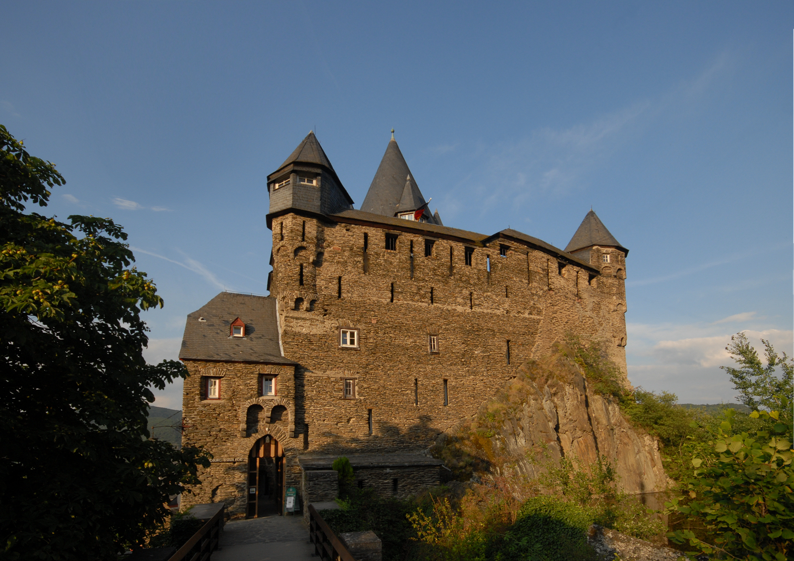 Burg Stahleck über Bacharach, Schildmauer und Eingang